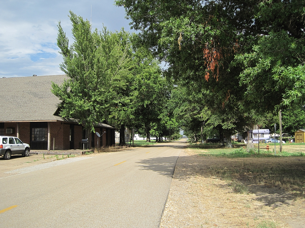 Twist, Arkansas.